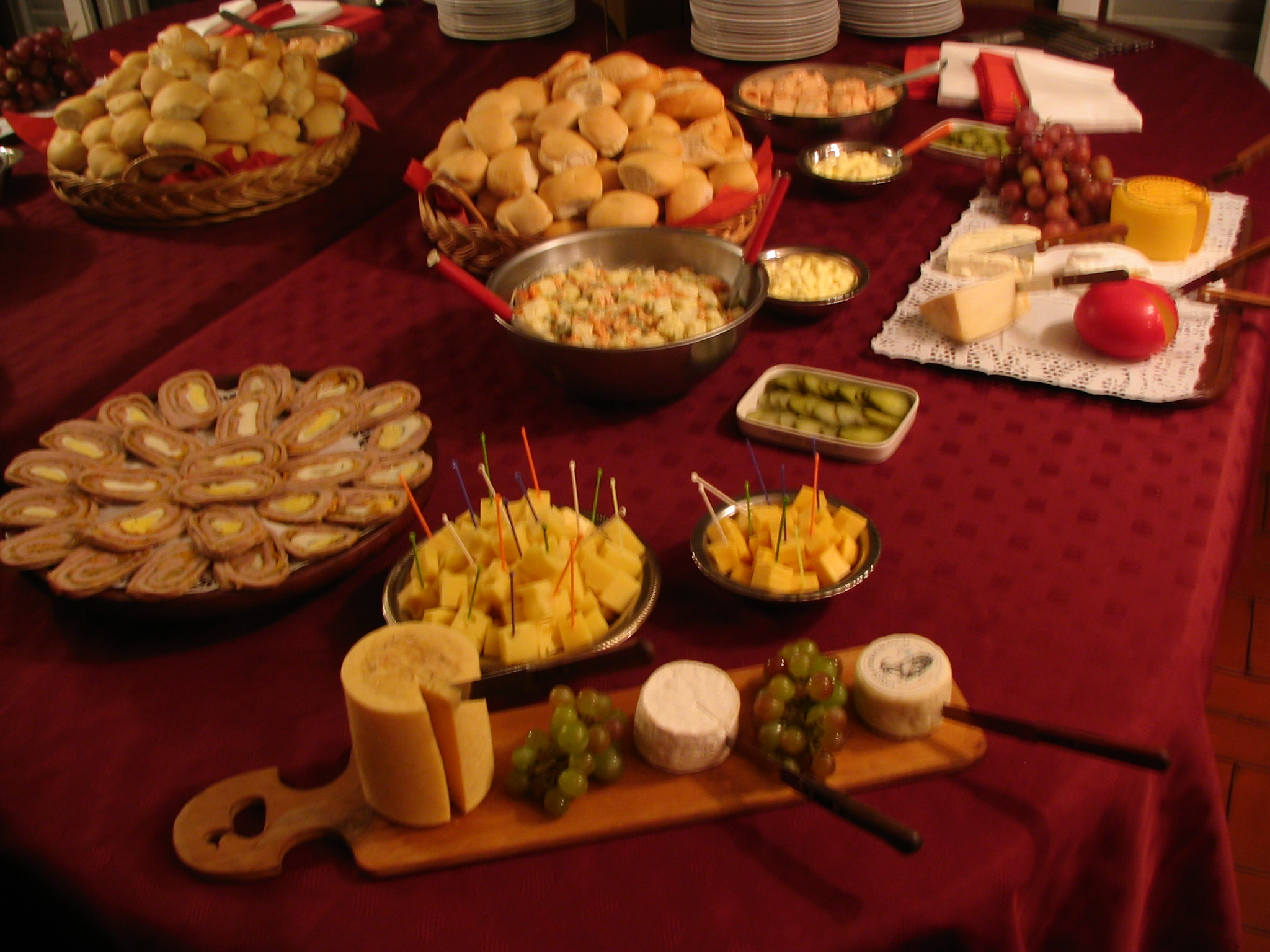 Argentinan Buffet